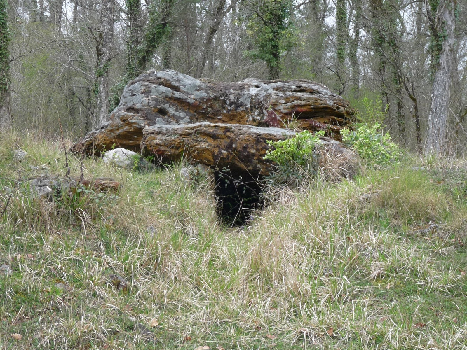 Entrée, au sud-est. Dolmen de la Gélie, Edon, Charente, France